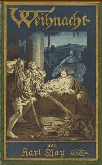 Karl may: Weihnacht!